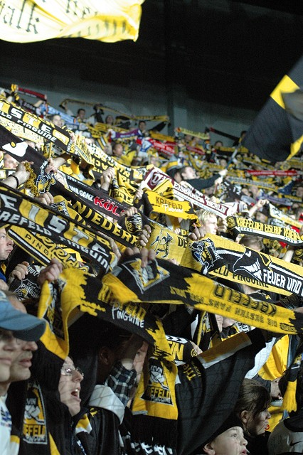 Eishockeyfans/ Krefeld Pinguine